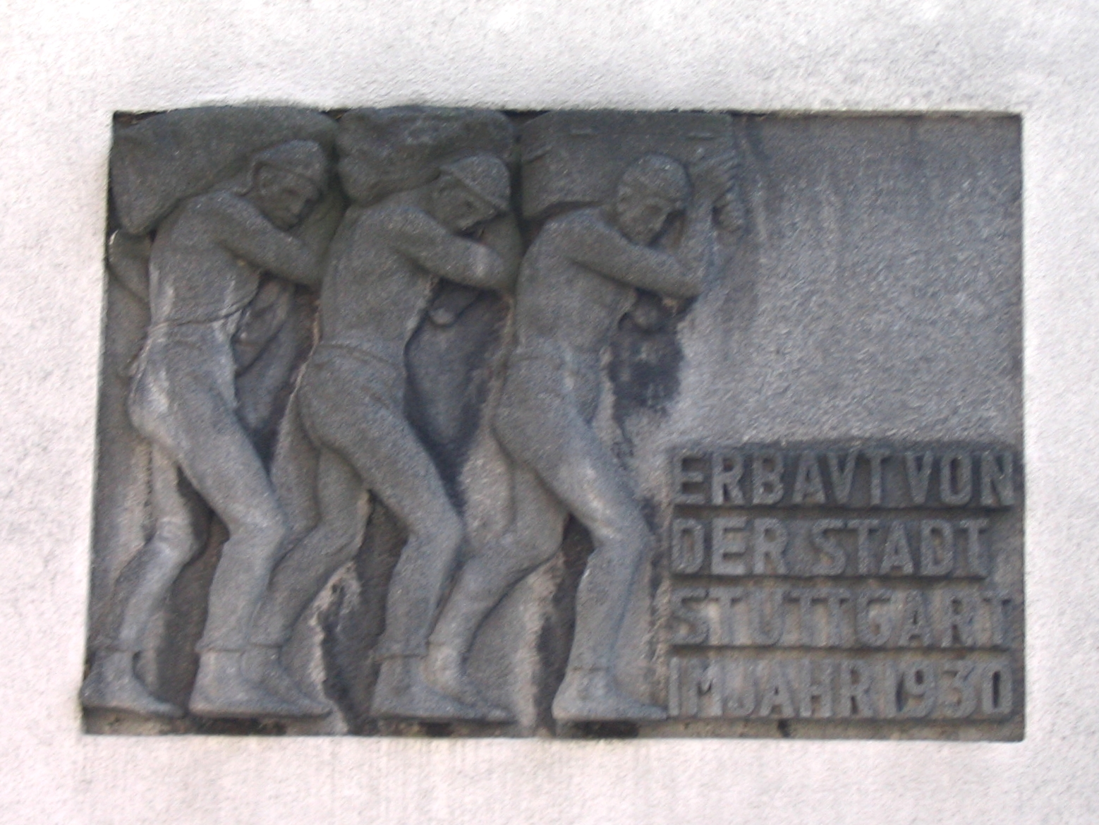 Gedenktafel am Döckerbau der Stuttgarter Schönbühlsiedlung an der Ostendstraße.